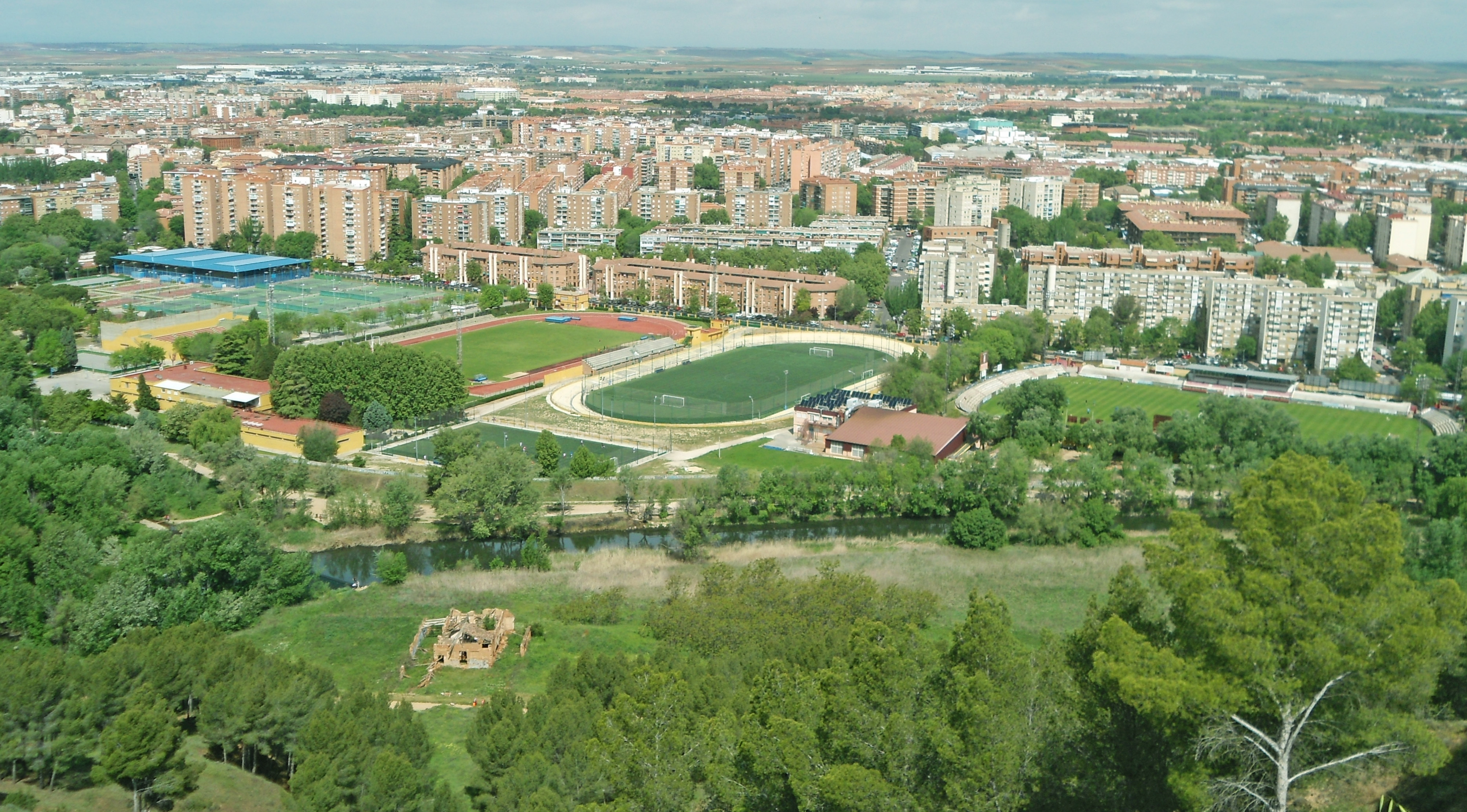 Hermosa vista del rio Henares desde un pequeña y acogedora cima This is a photography of a Special Area of Conservation in Spain with the ID: ES3110001. Natura2000 entry, EEA entry